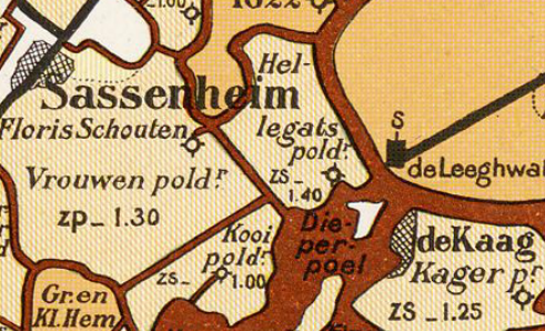 Hellegatspolder